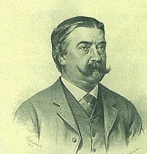 Karl Freiherr von Hasenauer, picture around 1880